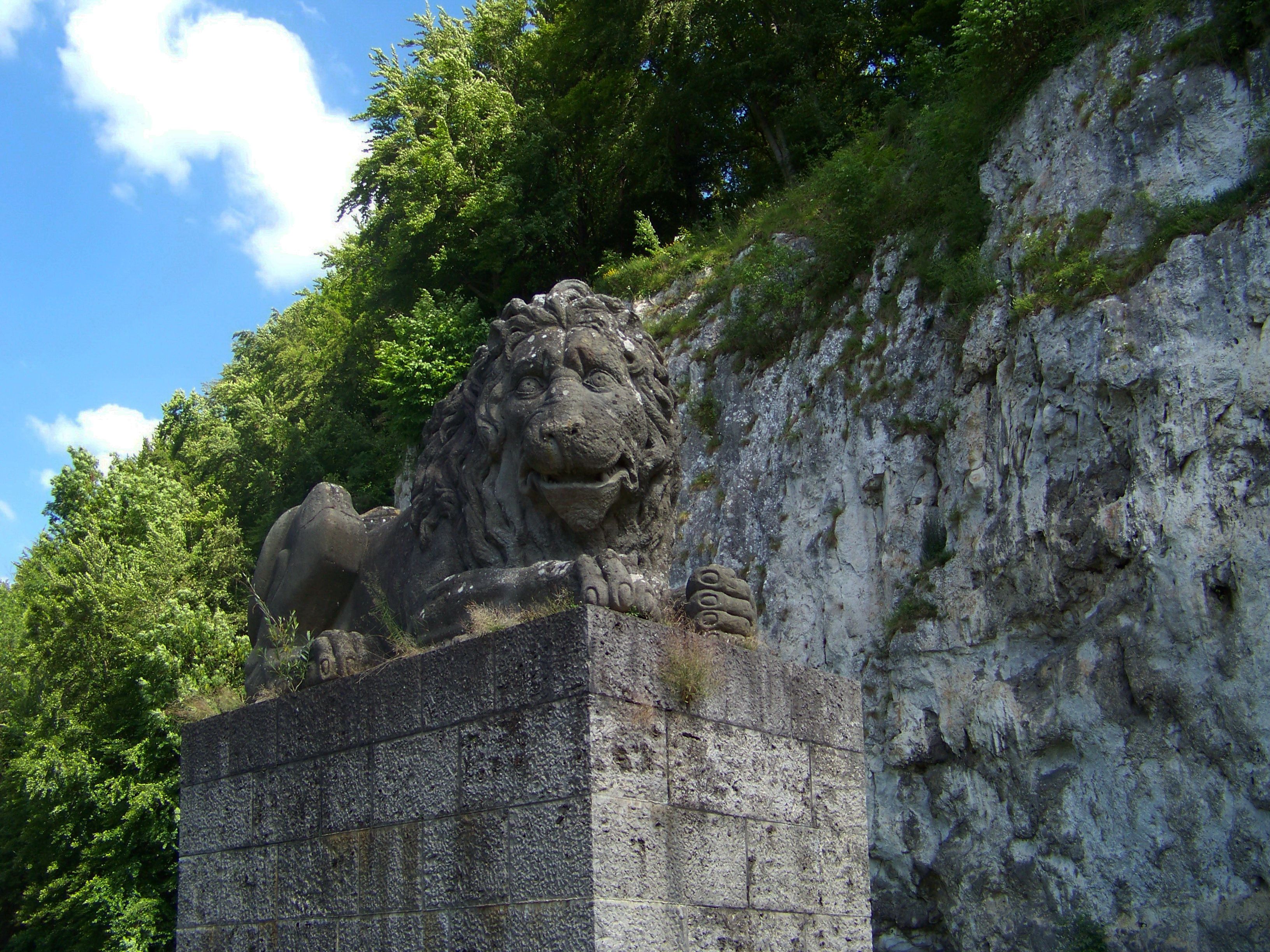 Bad Abbach, Eiermühle, Mühlberg. Löwendenkmal. Denkmal mit zwei liegenden Löwen auf hohen Postamenten, Bildhauer Franz Xaver Muxel, bezeichnet 1794; Zerstörung 1945; Rekonstruktion 1978 nach Entwürfen von Richard Triebe.